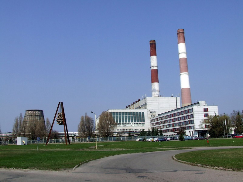 Kauno termofikacinė elektrinė.